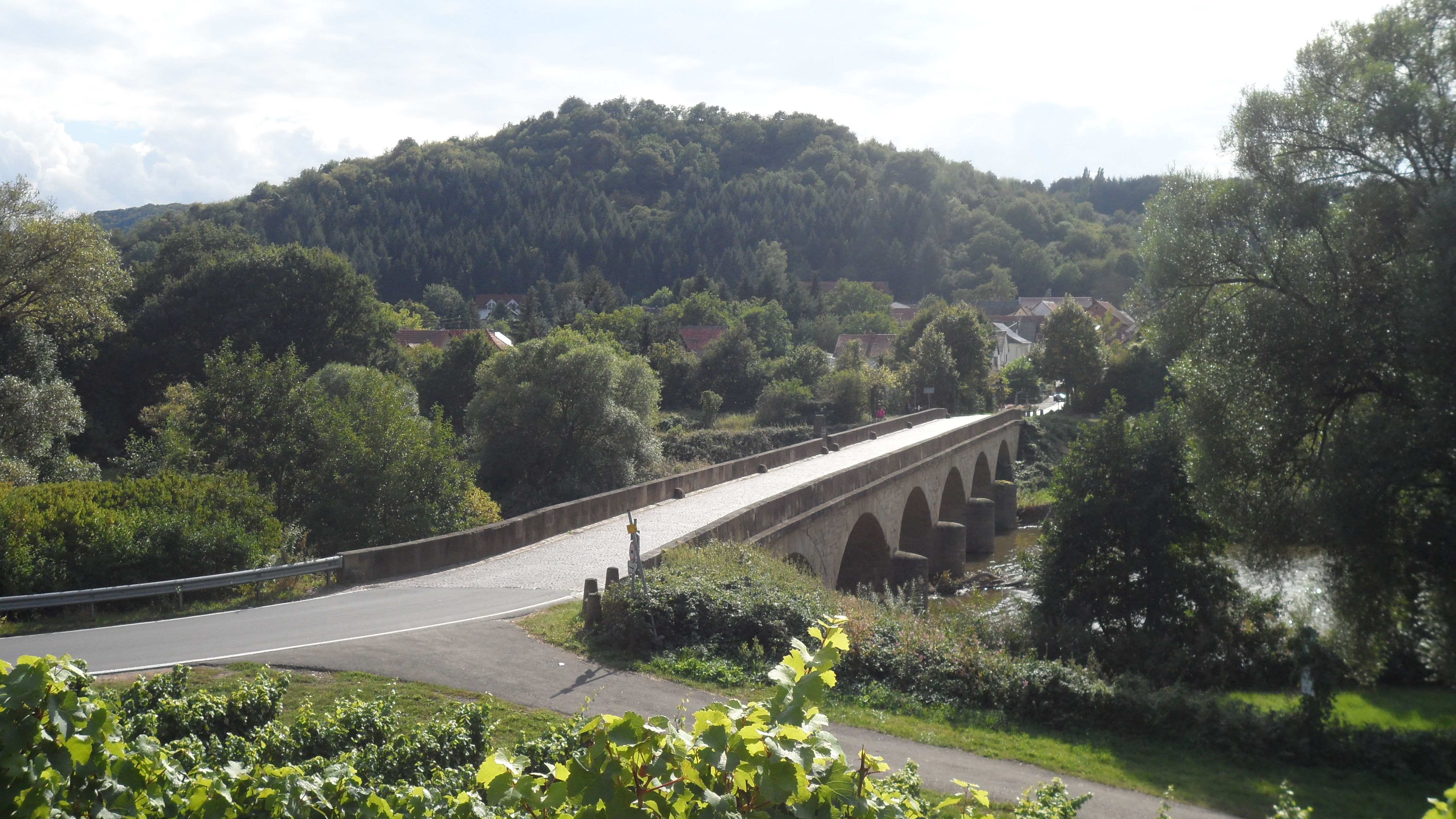 Sechsbogige Luitpold-Brücke über die Nahe in Oberhausen an der Nahe aus Sandsteinquadern, Baumeister Bezirksbauschaffner N. Emrich, Kirchheimbolanden. 1889, drei Jahre nach Herrschaftsantritt, ließ der ab 1886 bayrische Prinzregent Luitpold (1821-1912) die historische Sandsteinbrücke erbauen, um den Winzern mit ihren Trauben und Weinen den Weg zu den Handelshäusern in Bad Kreuznach zu erleichtern. Die Nahe, über die die Luitpoldbrücke führt, war nach dem Wiener Kongreß zeitweise Grenzfluß und trennte das Königreich Bayern (genauer die Bayerische Pfalz - auch genannt: Kurpfalz) von Preußen und ist heute das Wahrzeichen des Ortes.